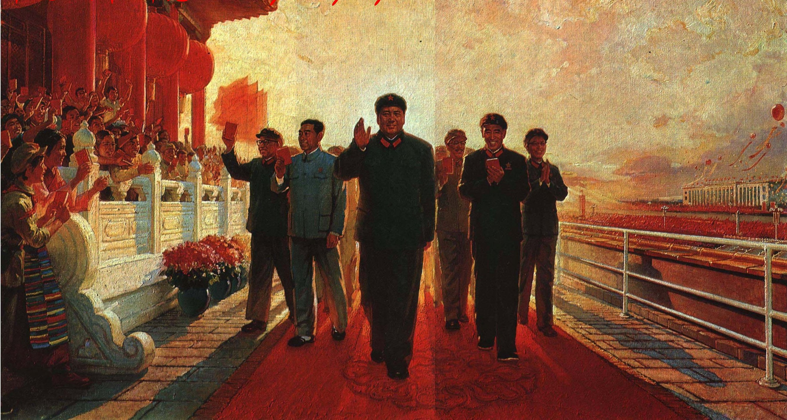 1967-11 1967年 毛泽东接见红卫兵油画